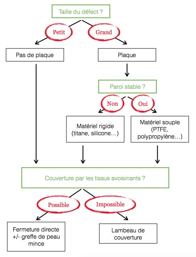 Arbre décisionnel des techniques de reconstruction de la paroi thoracique après pariétectomie, d'après Losken et al, Br J Plast Surg. 2004